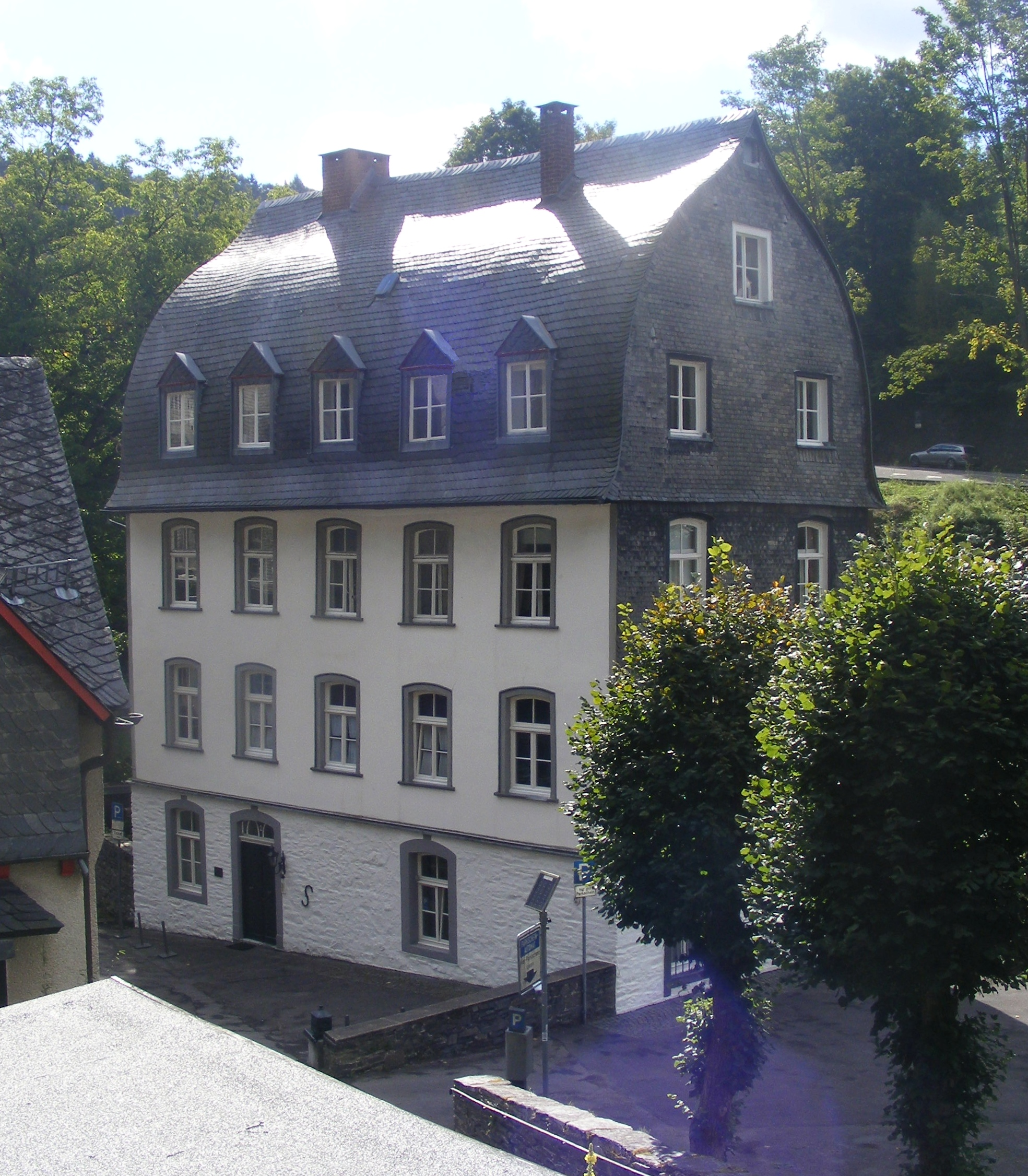 Monschau Rosenthal 2 GibelThis is a photograph of an architectural monument., no. 0